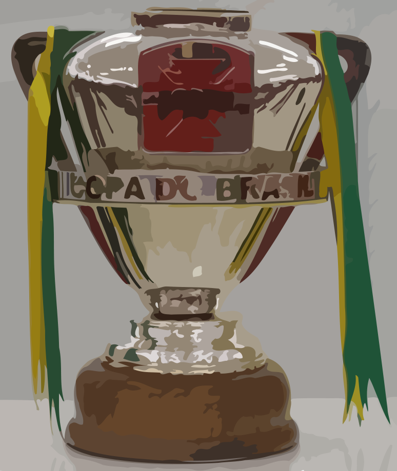 Nova Copa do Brasil